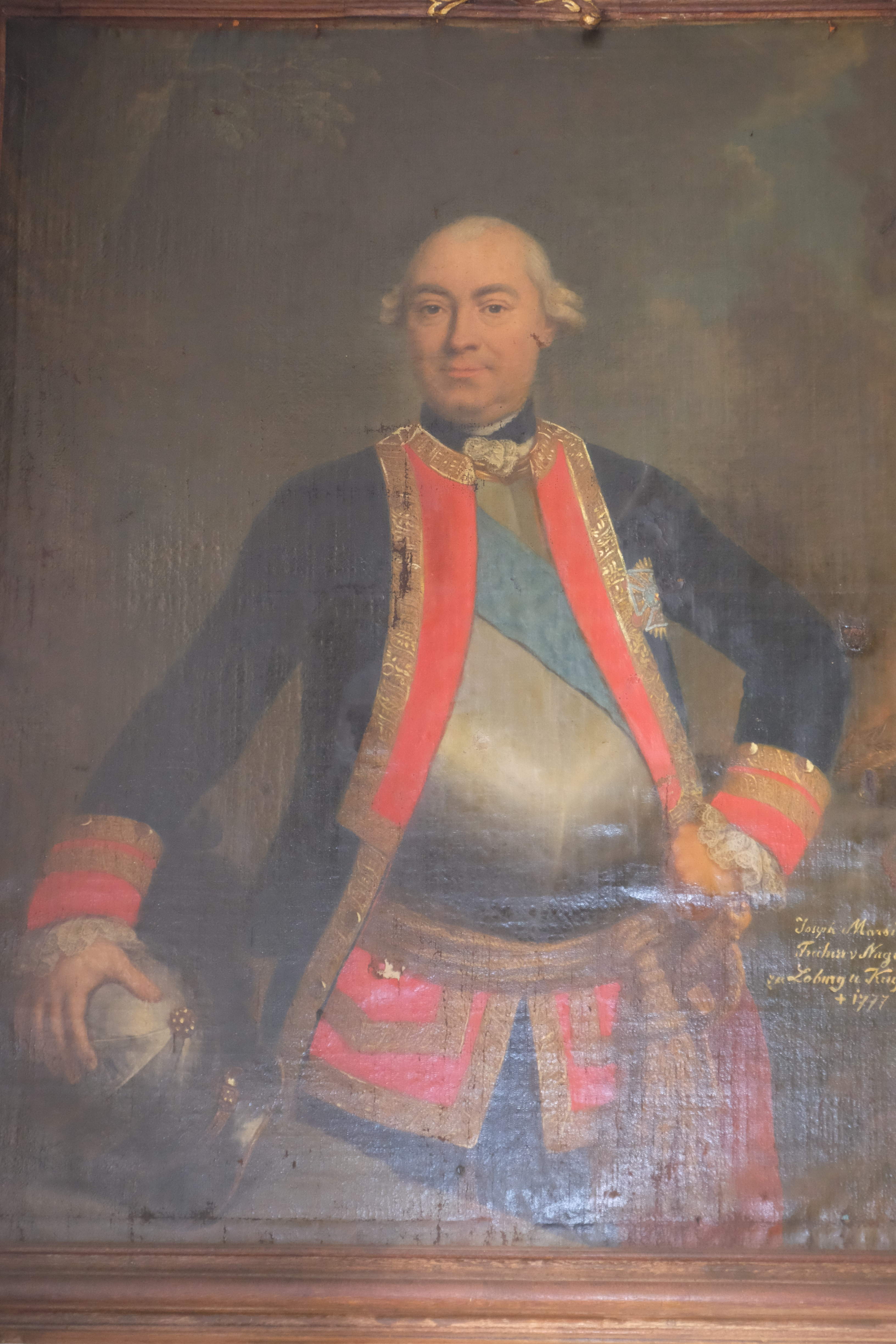 Schloss Tatenhausen mit freundlicher Genemigung von Freiin von Teufel zu Birkensee